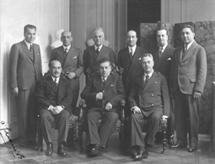 Fotografía de Arturo Alessandri Palma, Presidente de Chile (1920-1925; 1932-1938) junto a su Ministros de Estado, durante abril de 1934.